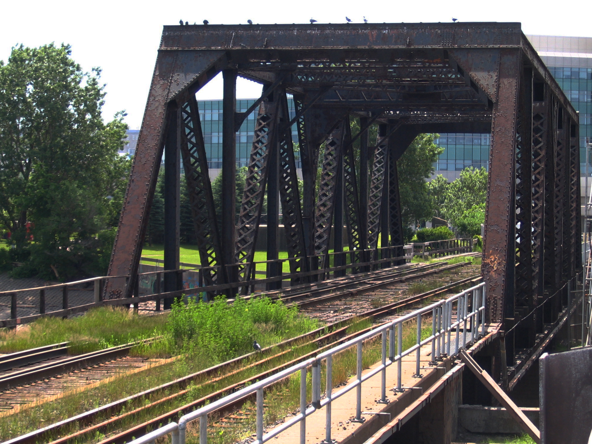 Pont ferroviaire parallèle au pont-tunnel Joseph-Samson, qui relie les quartiers de Saint-Roch et du Vieux-Limoilou, à Québec.